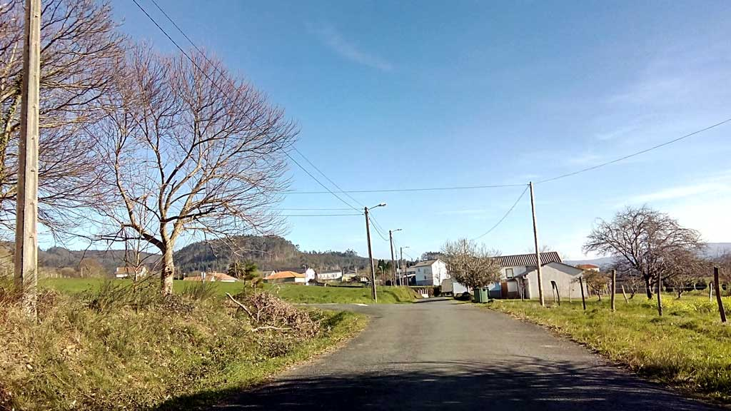 Vista do Rapadoiro, Sedes.